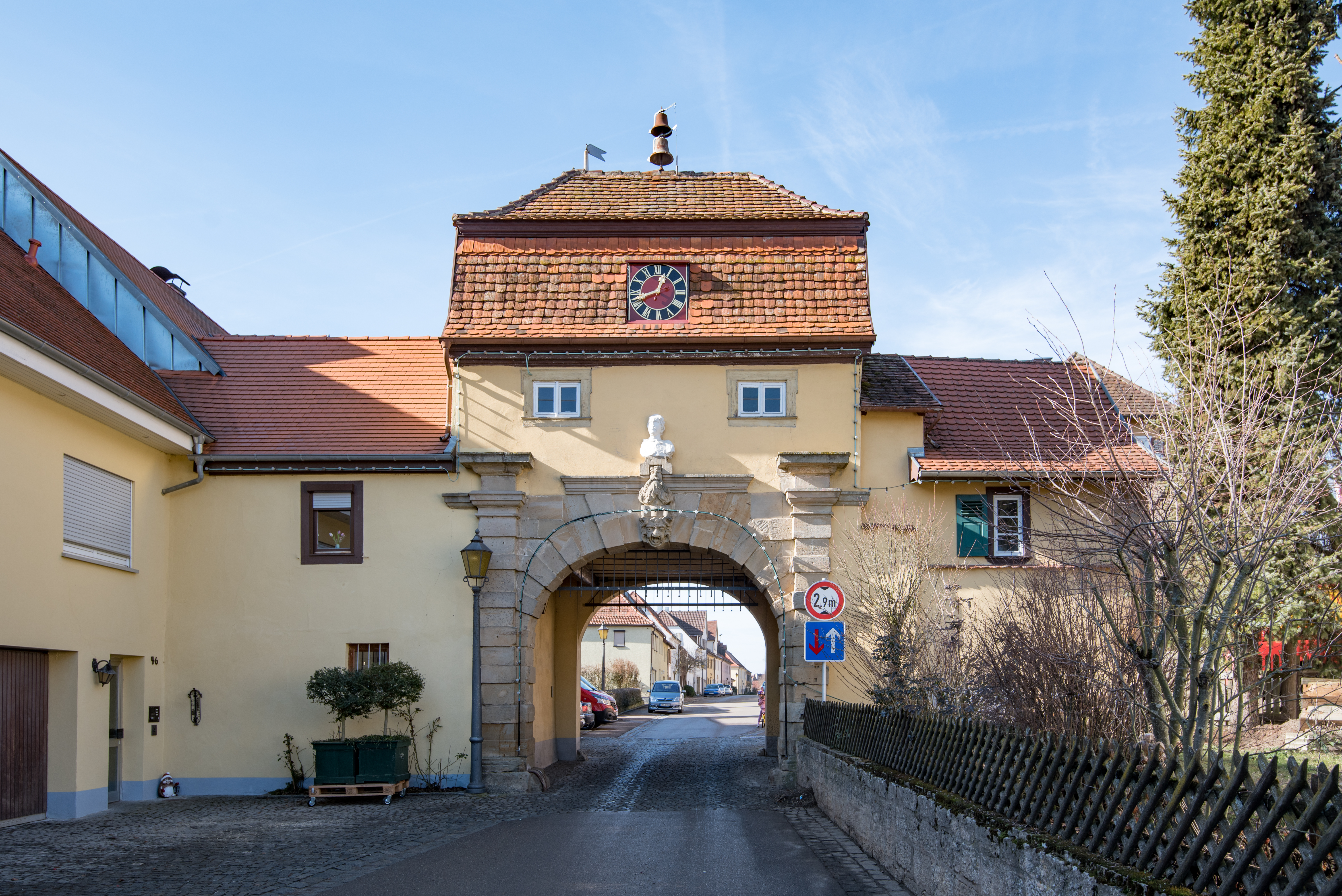 Schrozberg, Bartenstein, Schlossstraße 48 und 37